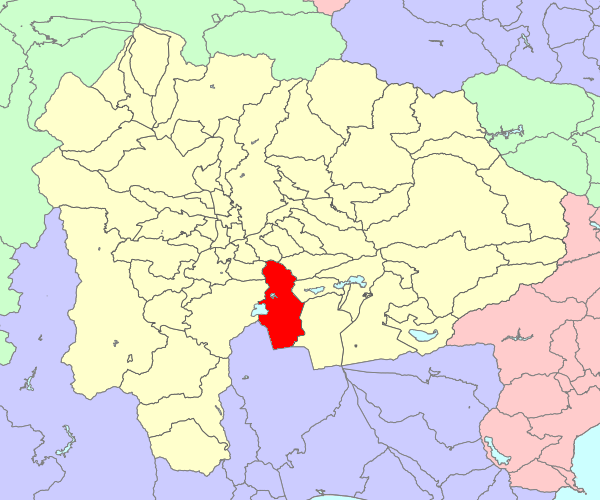 山梨県西八代郡上九一色村の位置画像。